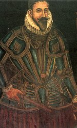 Francisco da Gama, 4.º conde da Vidigueira